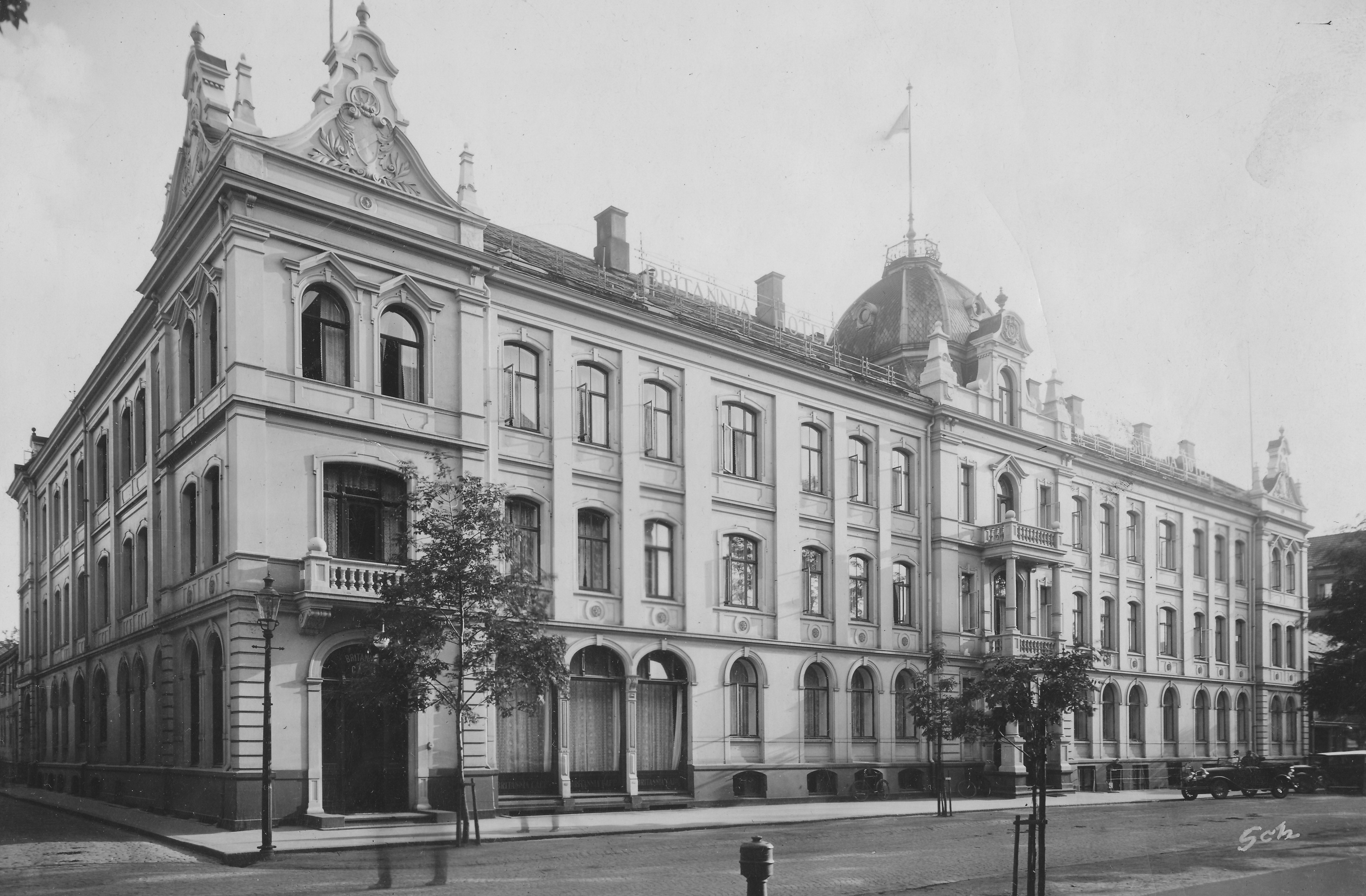 Format: Fotopositiv Dato / Date: Ukjent Fotograf / Photographer: Schrøder Sted / Place: Dronningens gate 5, Trondheim Street View: g.co/maps/hw4fh Wikipedia: Britannia Hotel Lenke / Link: Britannia Hotel (britannia.no) Eier / Owner Institution: Trondheim byarkiv, The Municipal Archives of Trondheim Arkivreferanse / Archive reference: Tor.H40.B07.F0367 [T0375] Dronningens gate 5 . Britannia Hotell ble utbygd rett etter århundreskiftet, og fikk Palmehaven i 1916. Den gamle tregården ble oppført tidlig på 1700-tallet av kjøpmann Johan Luytkis. Gården har også vært biskop Gunnerus eiendom. Den ble revet i 1896 for å gi plass til østfløyen av hotellet. Vestfløyen ses bortenfor tregården. Den ble oppført i 1708 på hjørnetomta mot Apotekerveita. Eiendommen ble i 1870 kjøpt av hotellvert Andreas Myhre, som grunnla hotellet. Første byggetrinn av den majestetiske bygningen ble oppført ca. 1895.